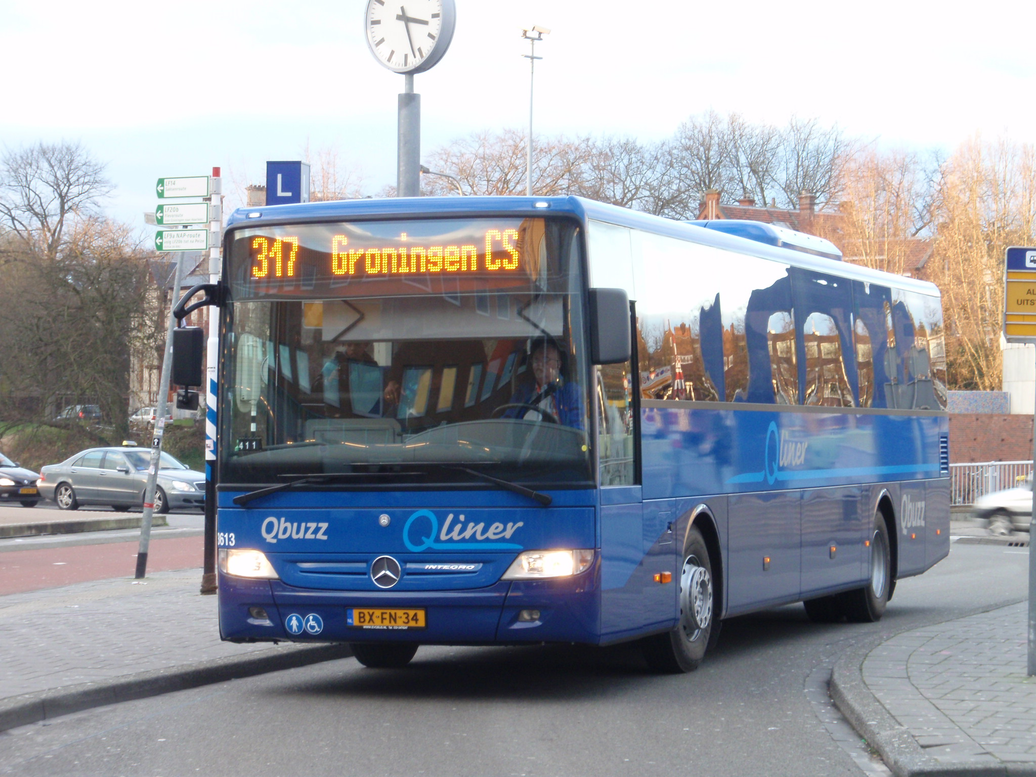 Qbuzz 3613 is een van de Qliner bussen die Qbuzz inzet op de Qlinerlijnen in de concessie Groningen/Drenthe